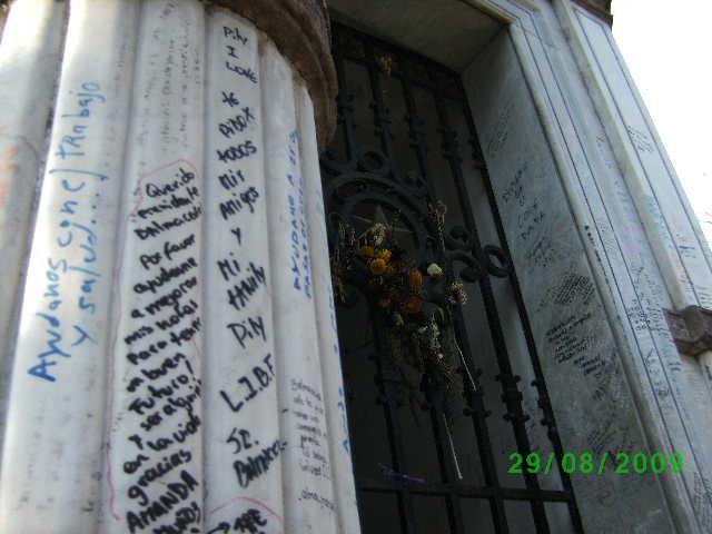 Escritos de estudiantes chilenos pidiendo favores en la tumba del Presidente martir Balmaceda